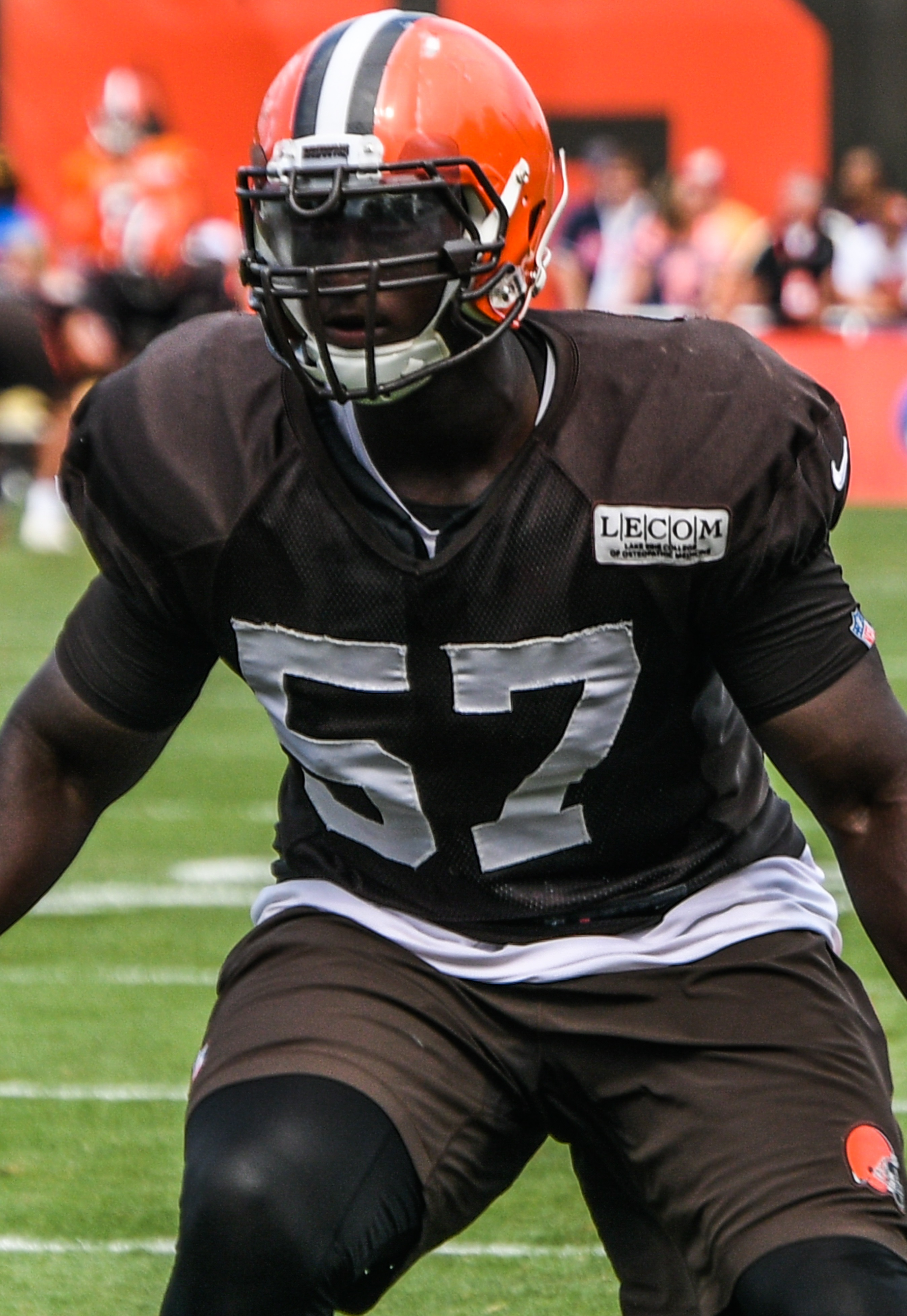 Johnson in 2017 training camp